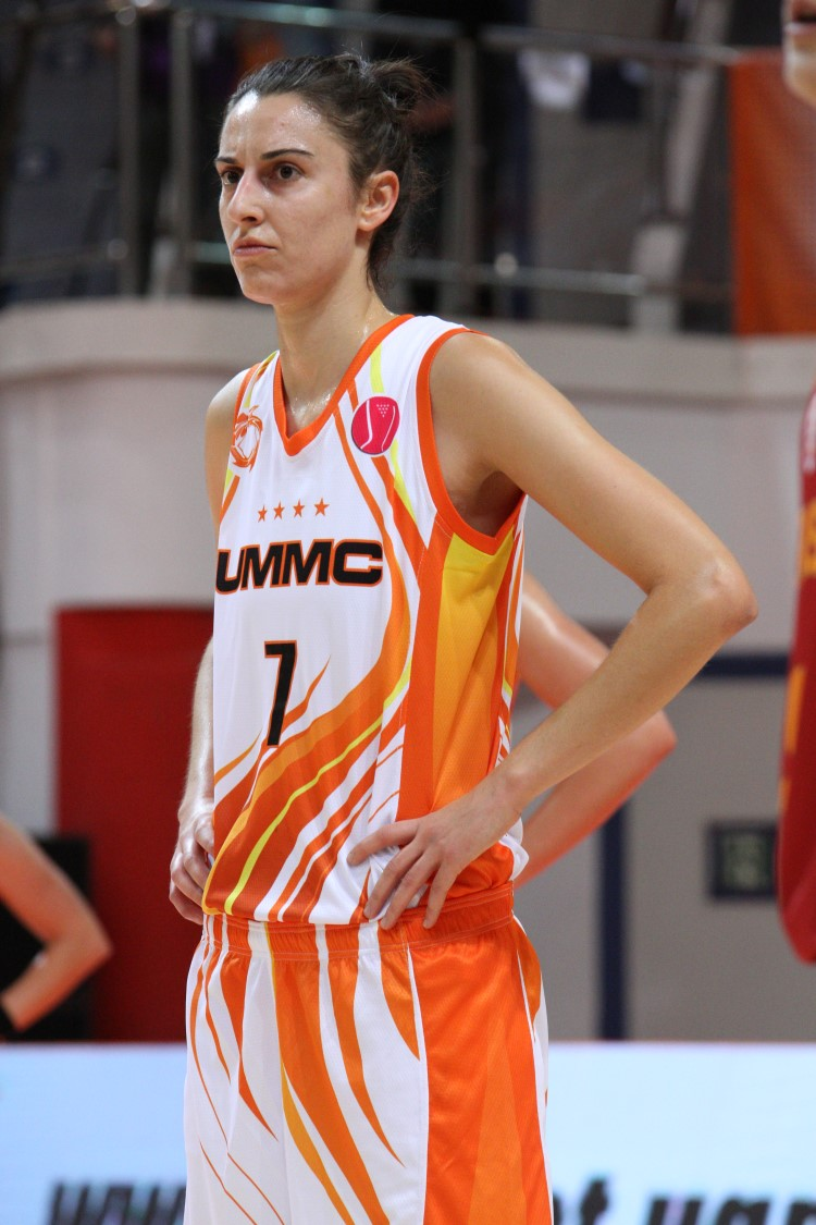 Баскетбольный клуб УГМК — обладатели Суперкубка Европы 2018